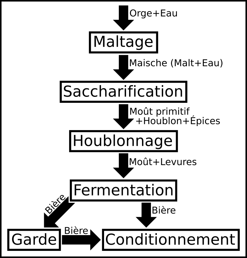 Diagramme de fabrication de la bière. «Fait maison» pour le Projet/Bière.